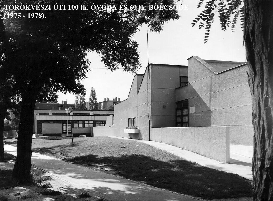 Törökvész úti óvoda és bölcsőde épülete, Budapest II. ker. (tervezte Rimanóczy Jenő, épült 1975 és 1978 között)